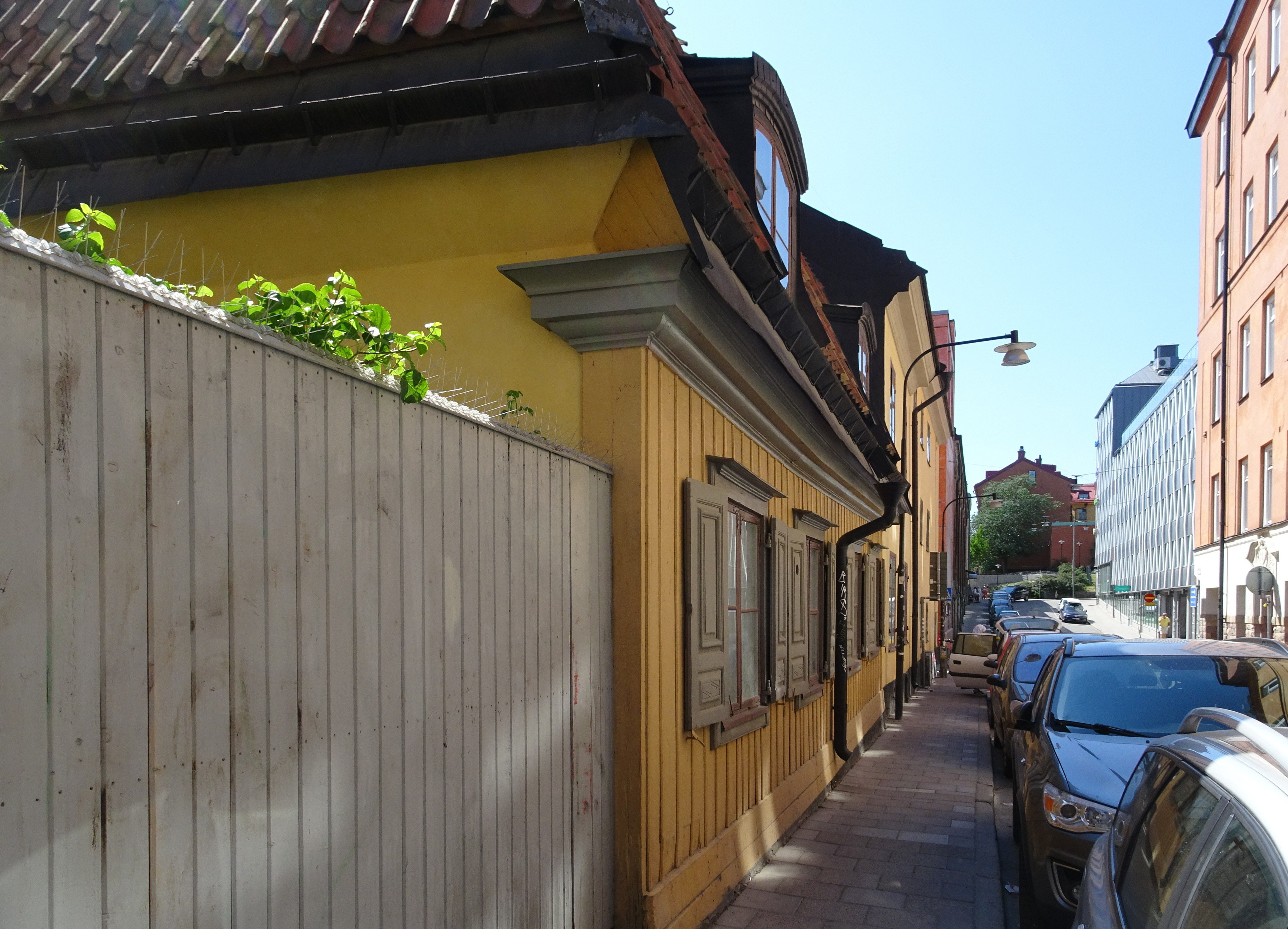 Fastigheten Sturen större 11, hörnet Kapellgränd 16 / Östgötagatan 23